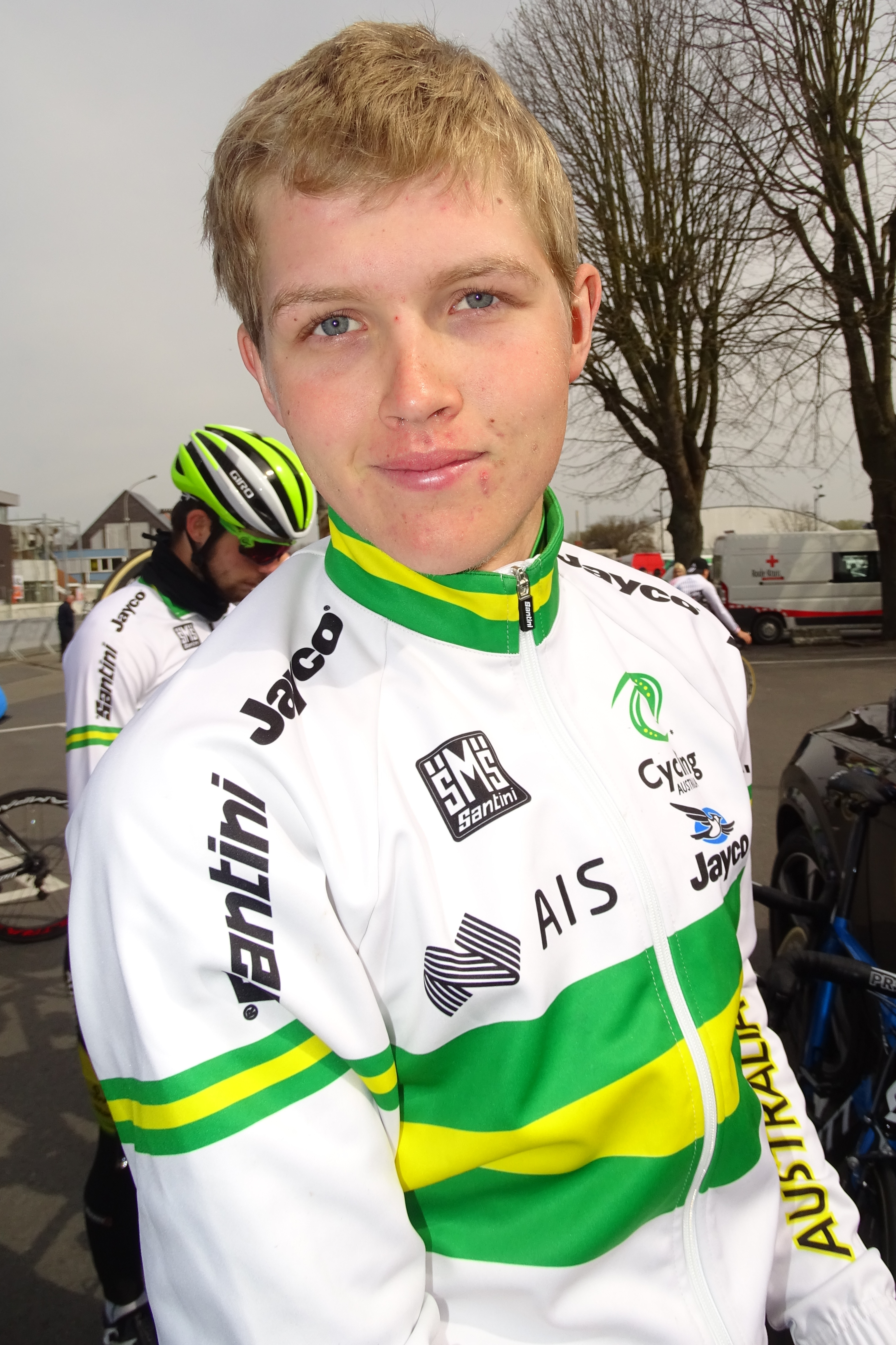 Reportage réalisé le samedi 9 avril à l'occasion du départ et de l'arrivée du Tour des Flandres espoirs 2016 à Audenarde, Belgique.